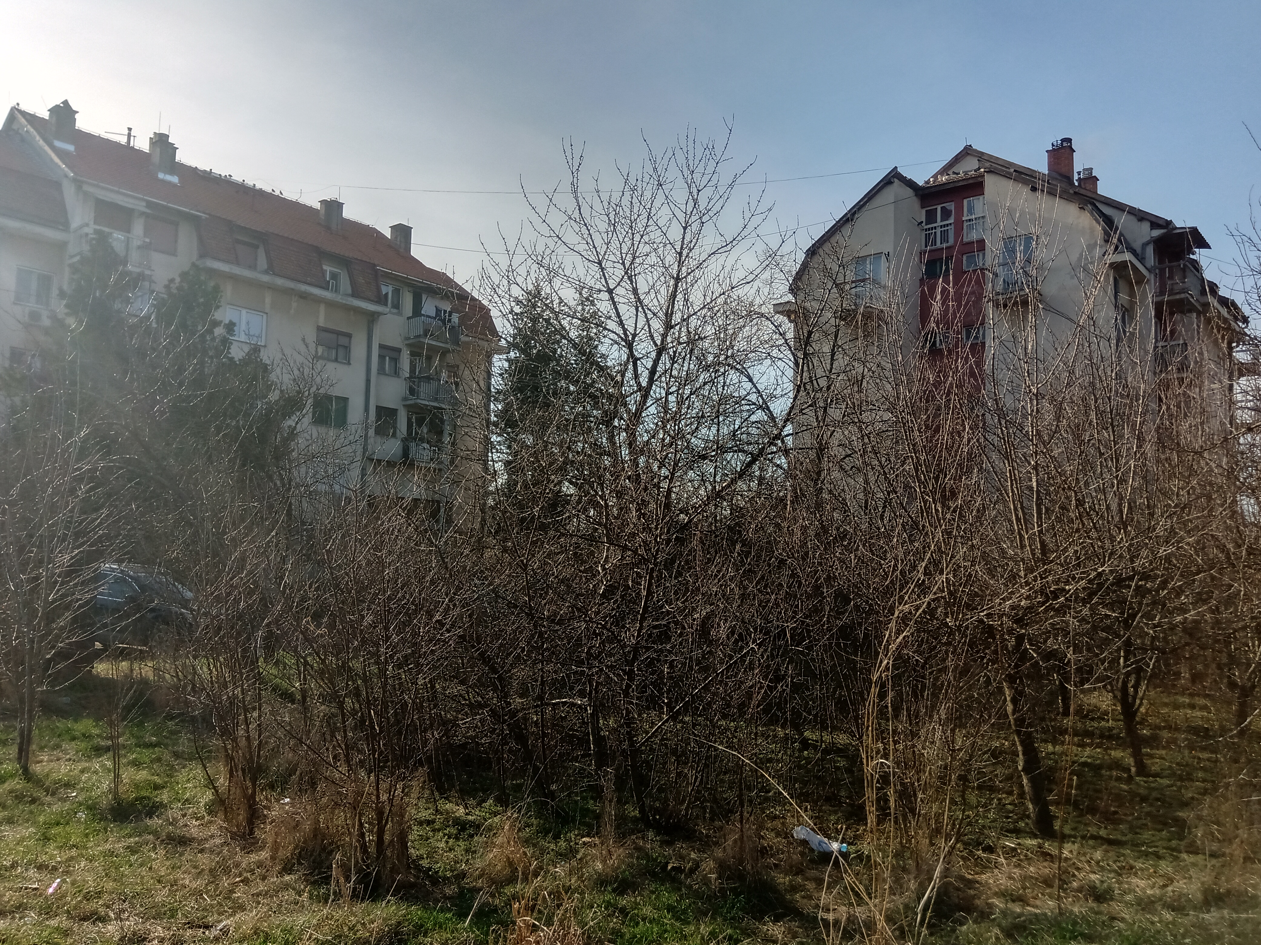 Насеље Врбовски